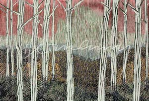 Gerhard Hermanns, Farbholzschnitt, Titel: Lichtung